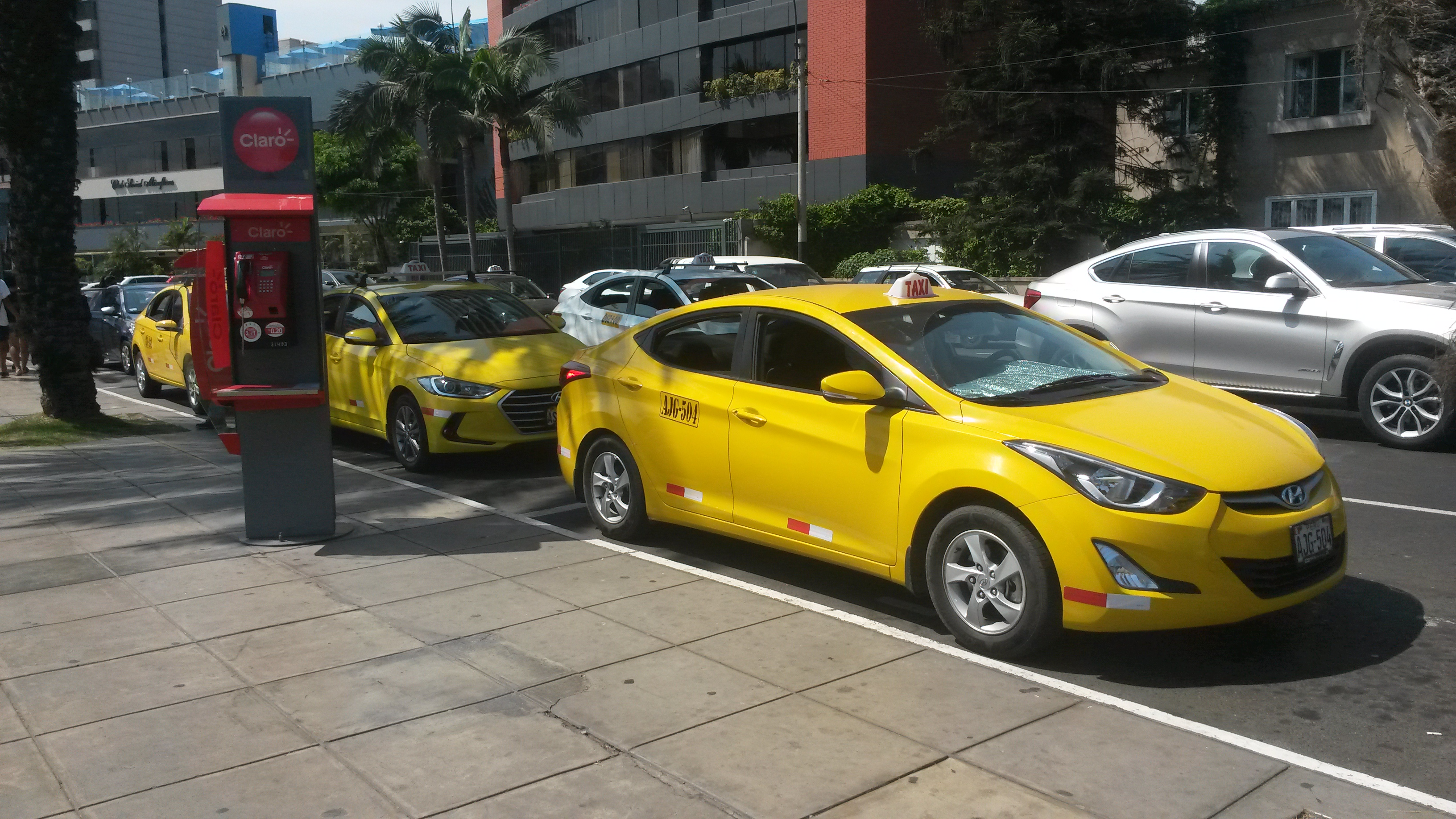 Yellow and modern taxis in Miraflores, Lima (Peru)